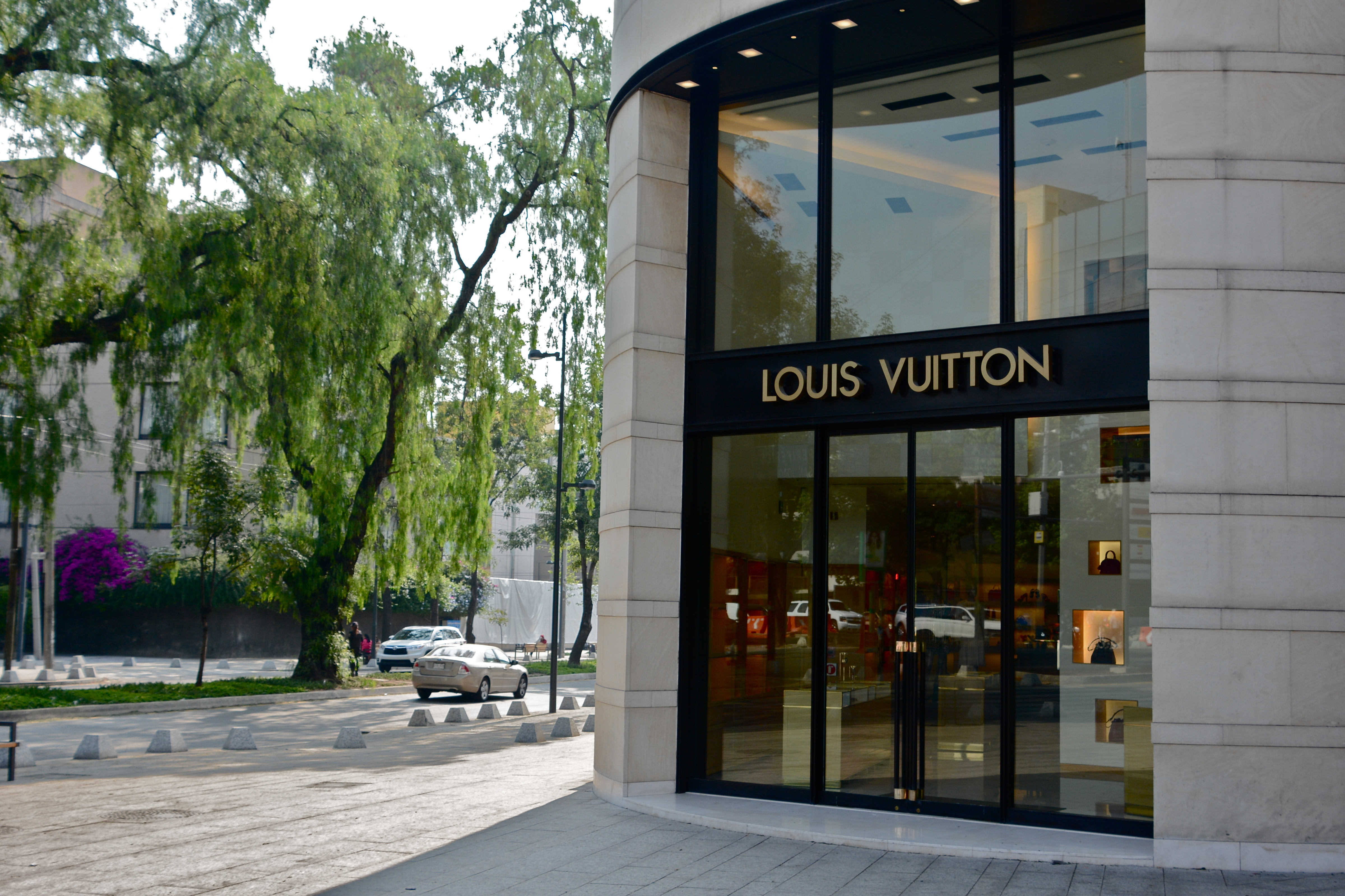 Polanco